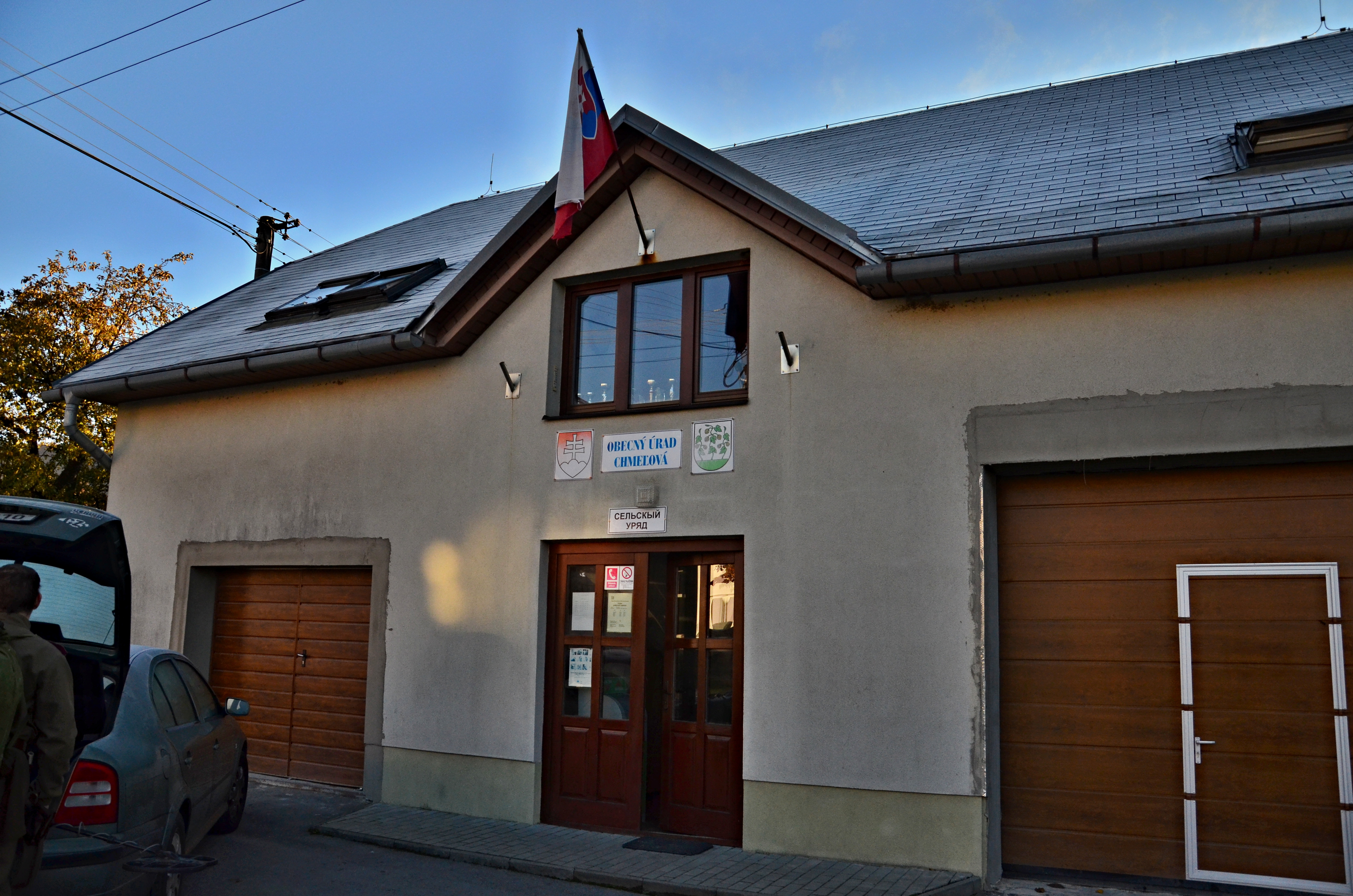 Obecní úřad v obci Chmeľová (okr. Bardejov) na Slovensku